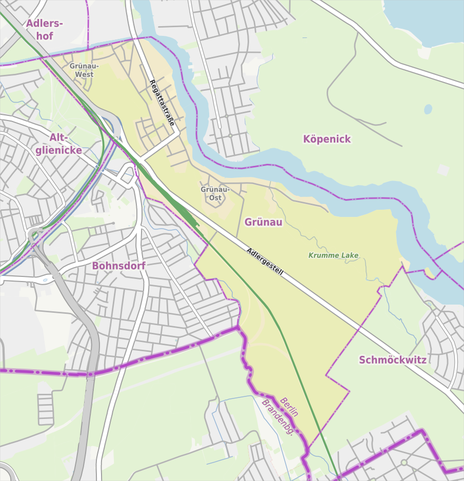 Übersichtskarte der Straßen und Ortslagen in Berlin-Grünau